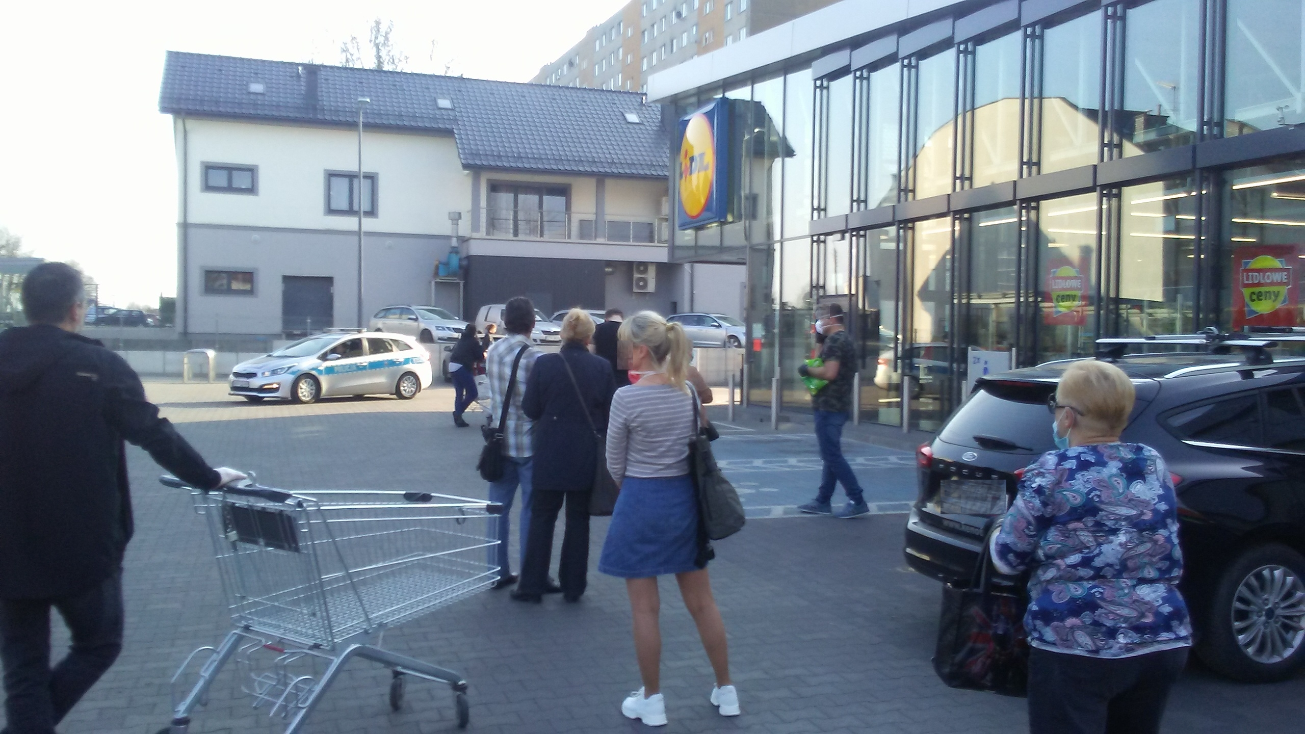 Kolejka przed Lidlem i profilaktyczna wizytya Policji w miejscu większych zbiorowisk